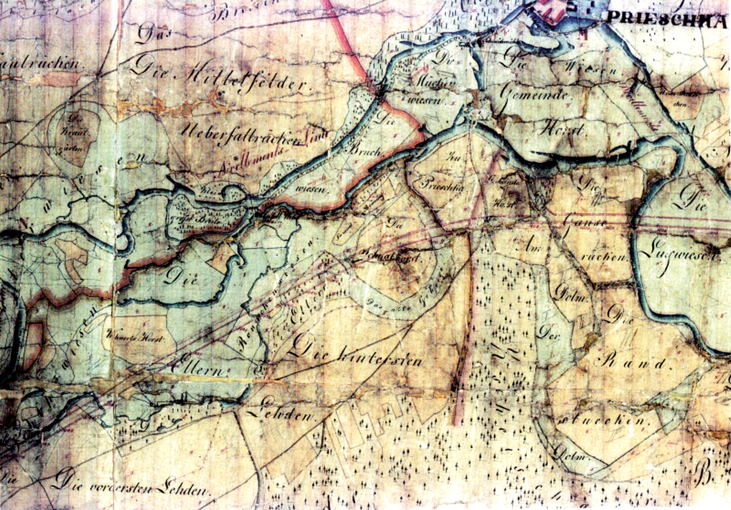 Planungskarte der Regulierung der Schwarzen Elster zwischen Würdenhain, Prieschka und Haida